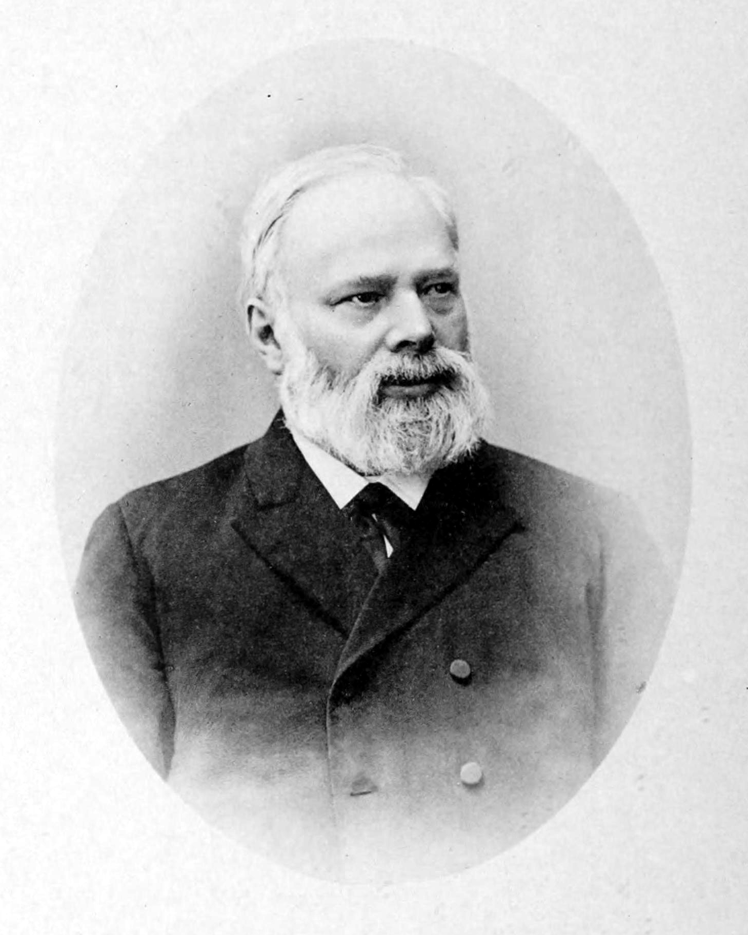 Portrait Theodor Husemann